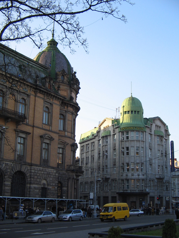 "Банковская брама" во Львове: Пражский банк и Галицкое кредитное общество